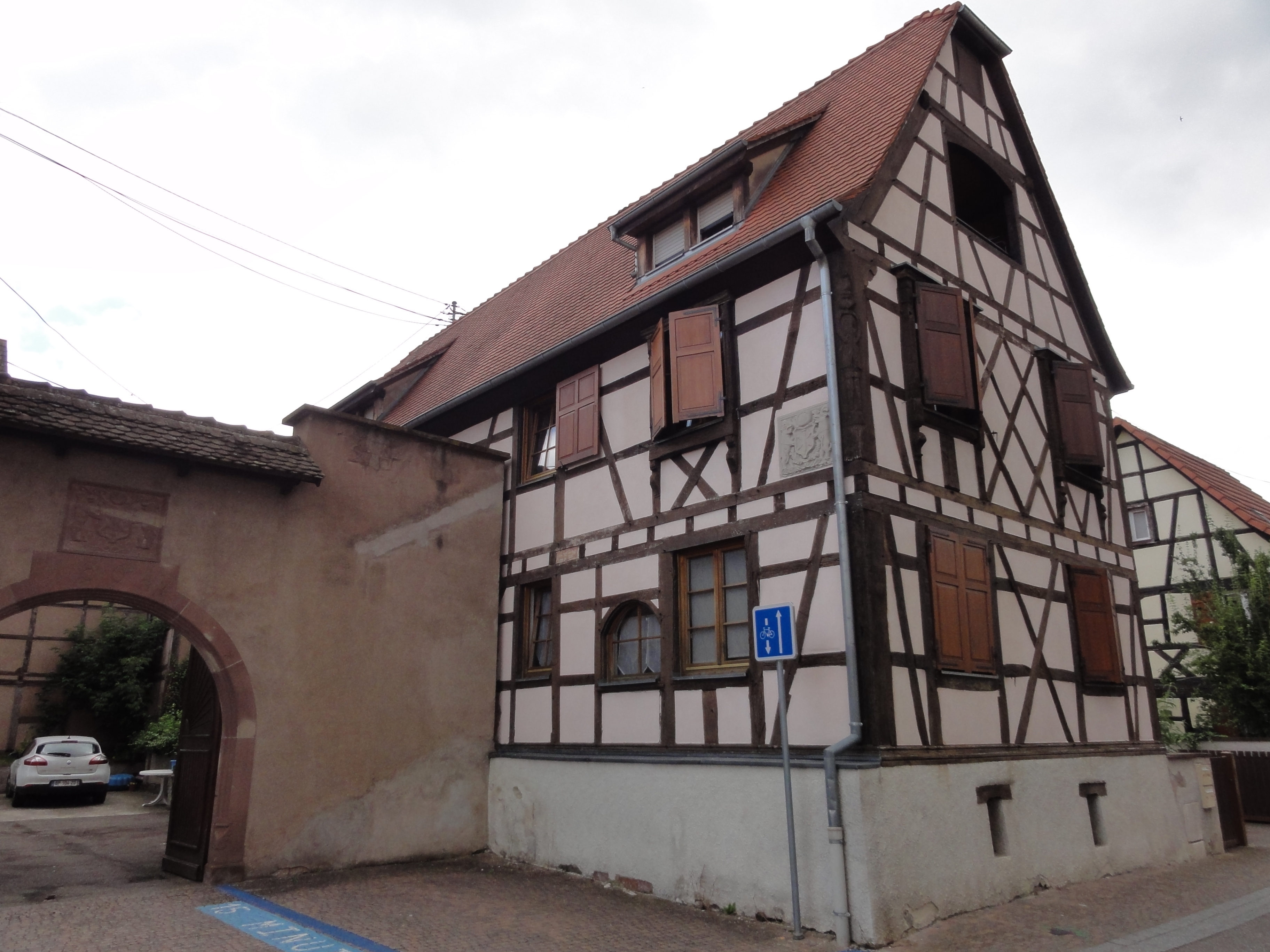 Alsace, Bas-Rhin, Erstein, Maison de tanneur (XVIIIe), 1 rue du Moulin. It is indexed in the Base Mérimée, a database of architectural heritage maintained by the French Ministry of Culture, under the references PA67000022 and IA00023256 .